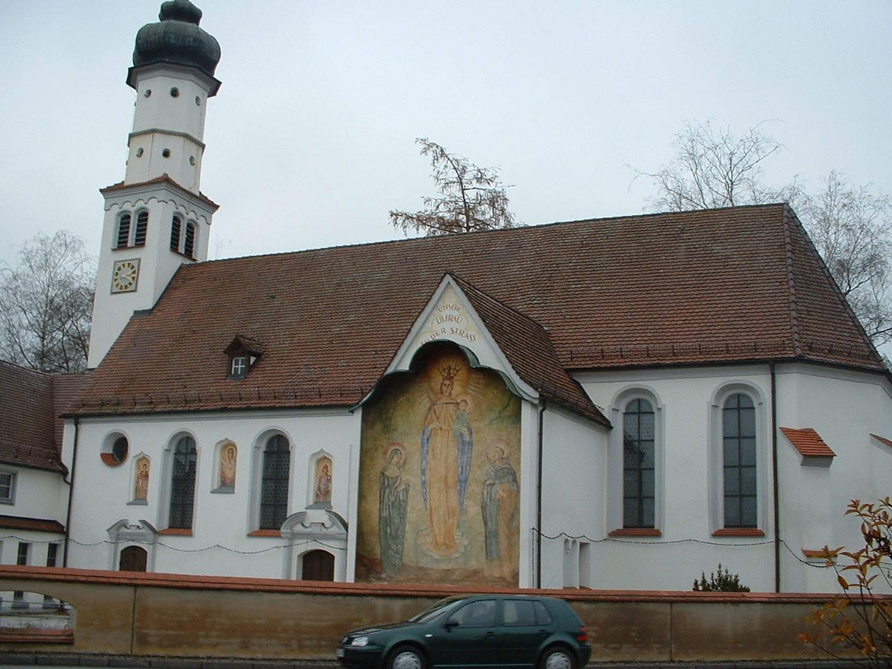 Laupheim, Kapelle St. Leonhard